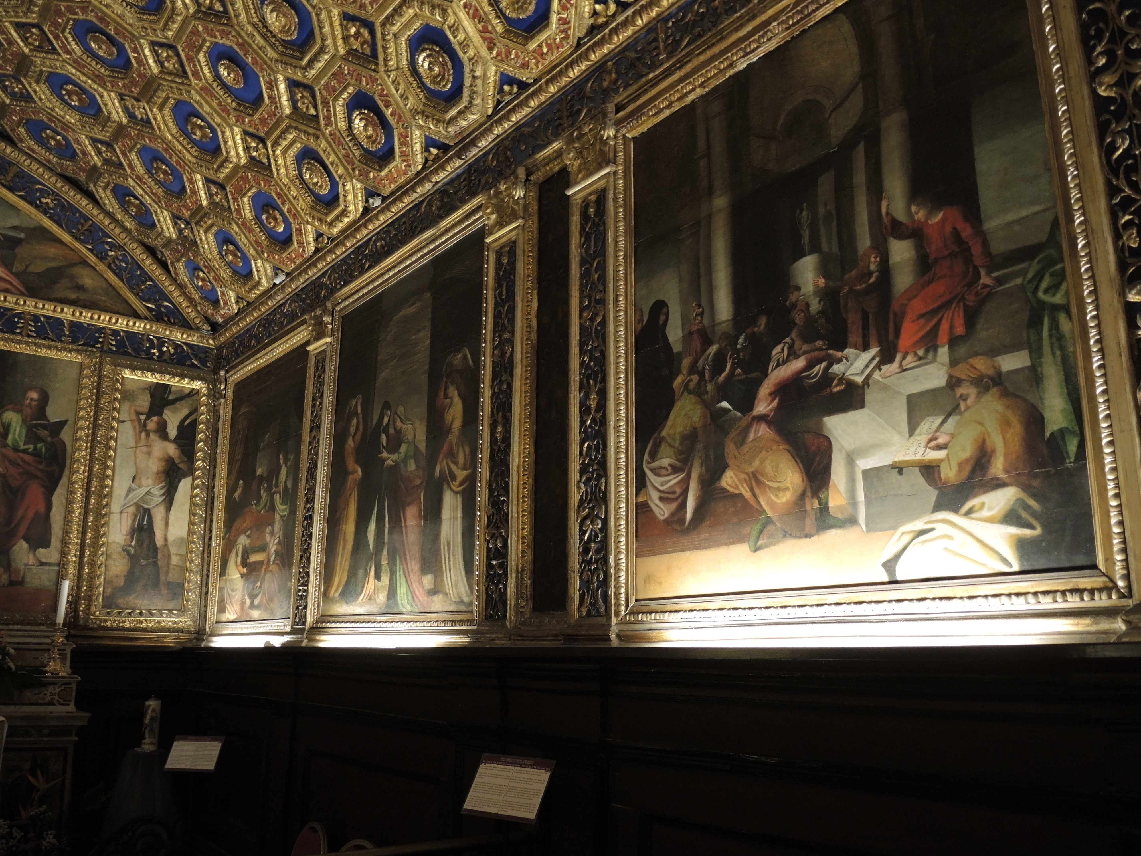 Gaeta: Cappella d'Oro